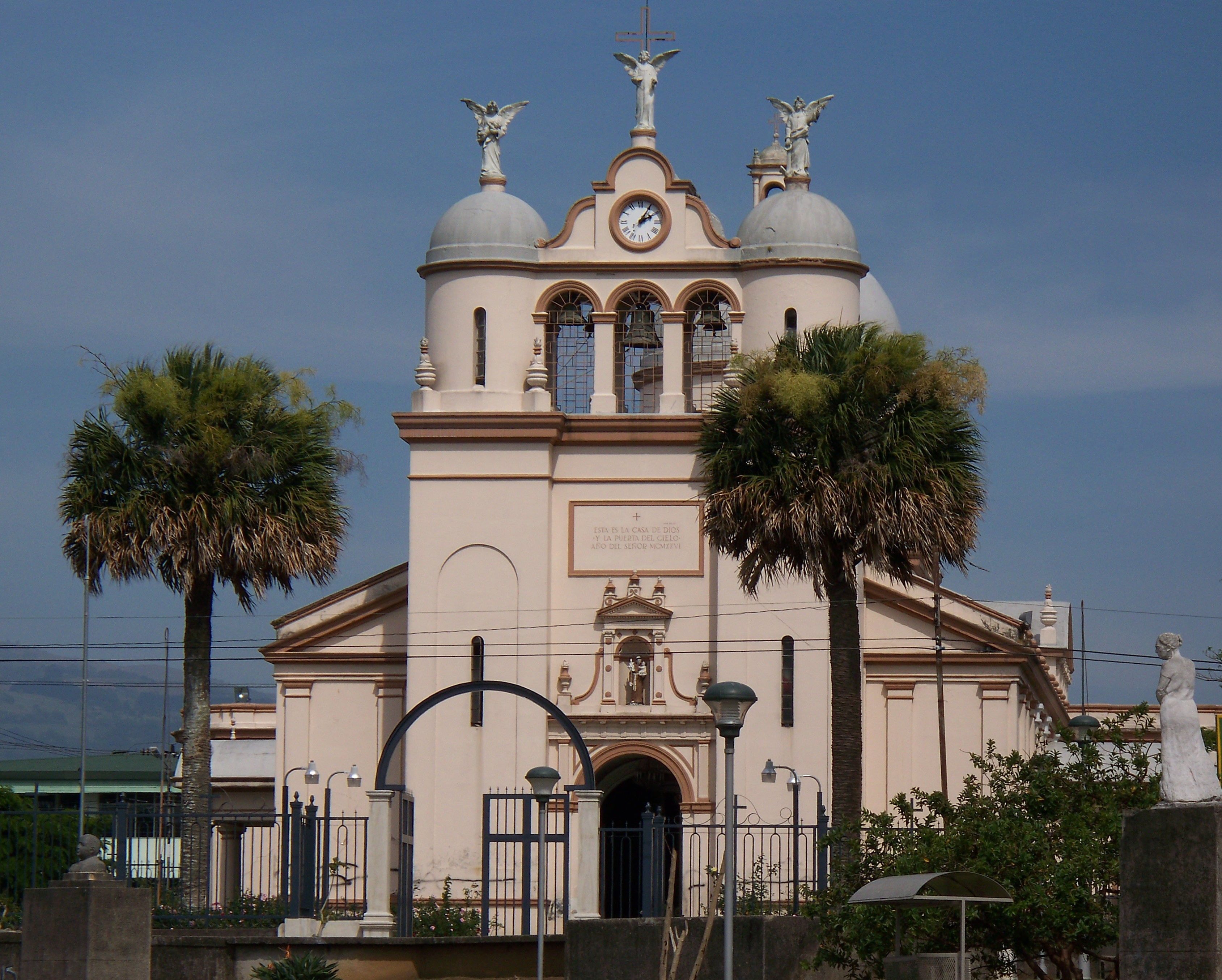 Catedral de Curridabat en el centro del pueblo al lado de parque central